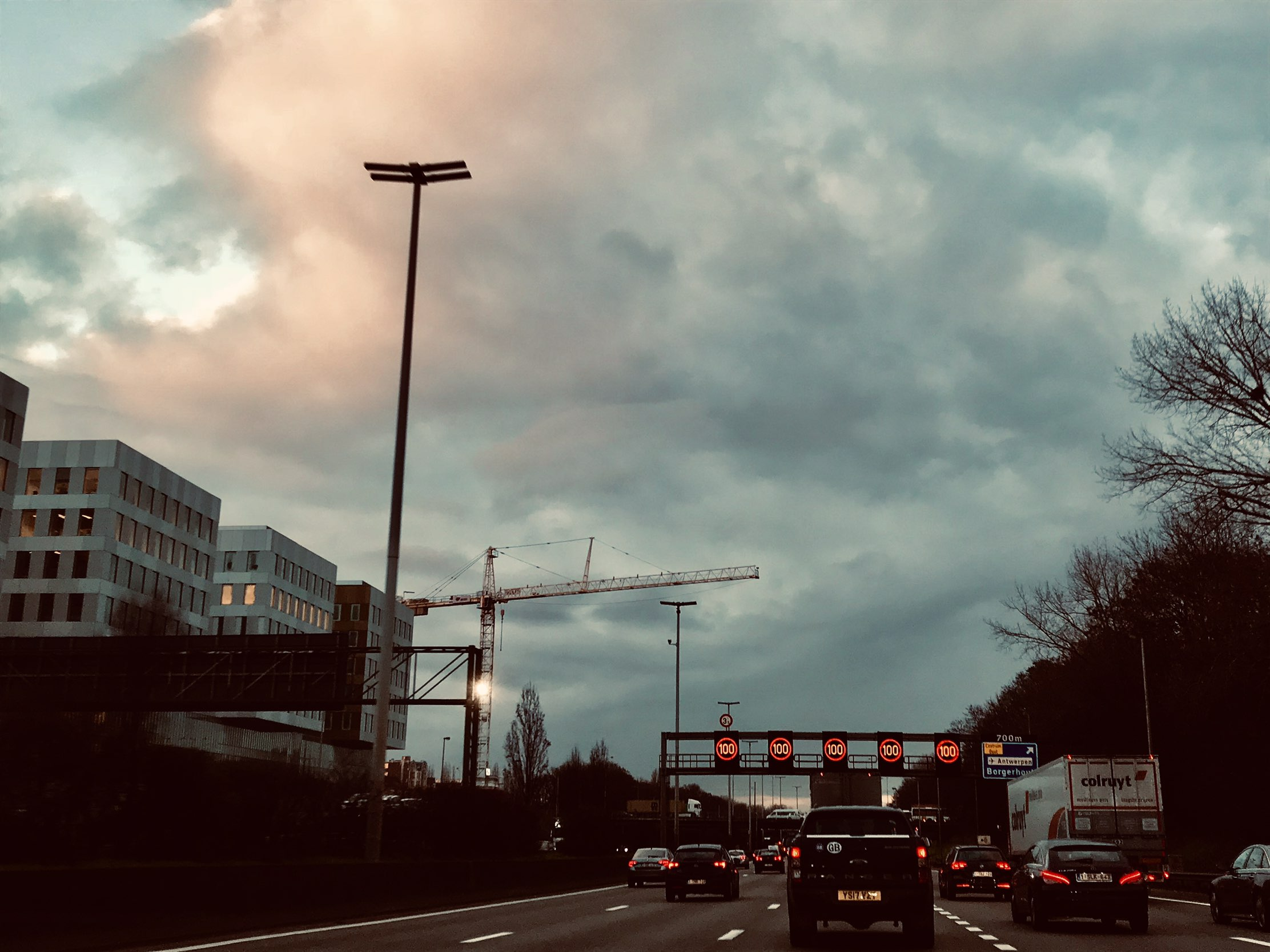 Spitstijden bij de Ring van Antwerpen (R1) in de avond